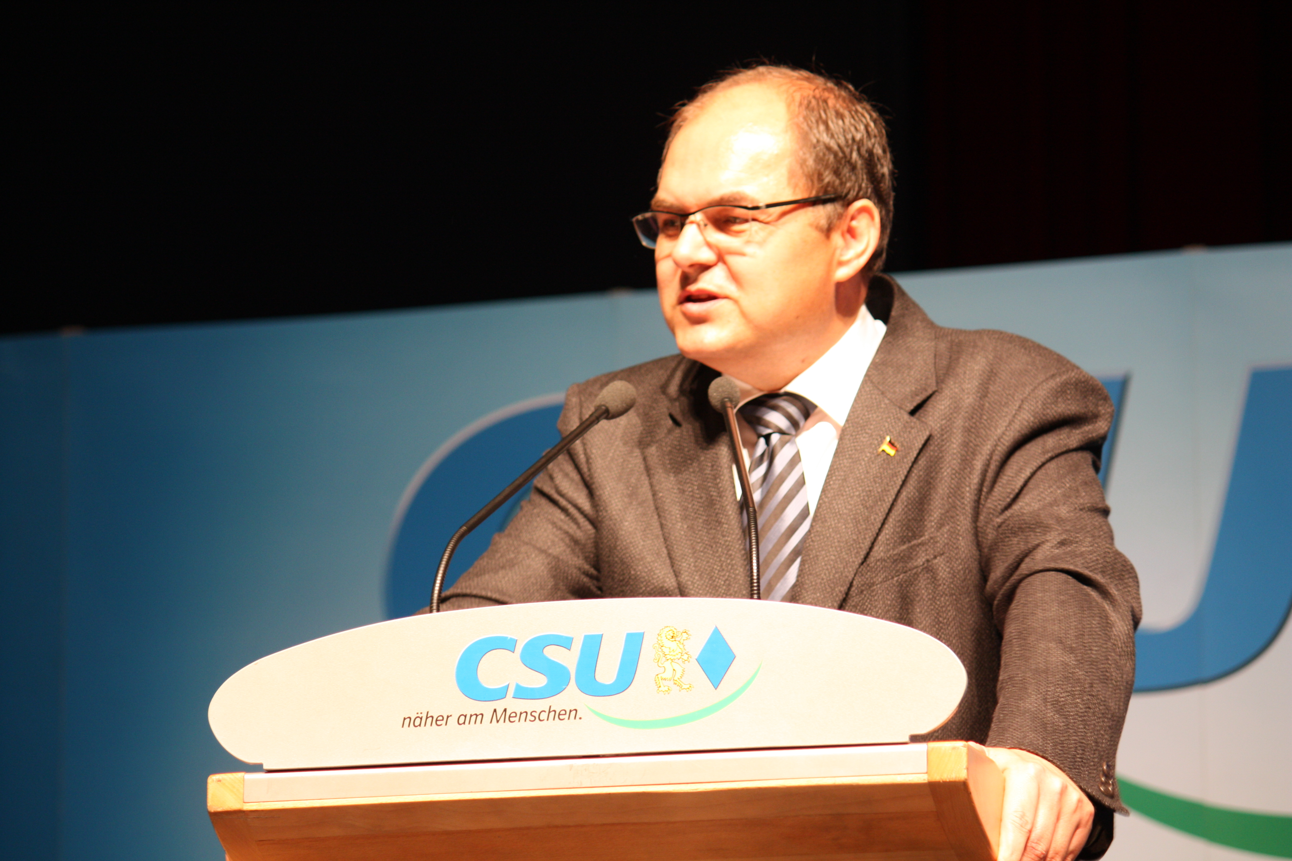 Parlamentarischer Staatssekretär im Bundesverteidigungsministerium Christian Schmidt (CSU)